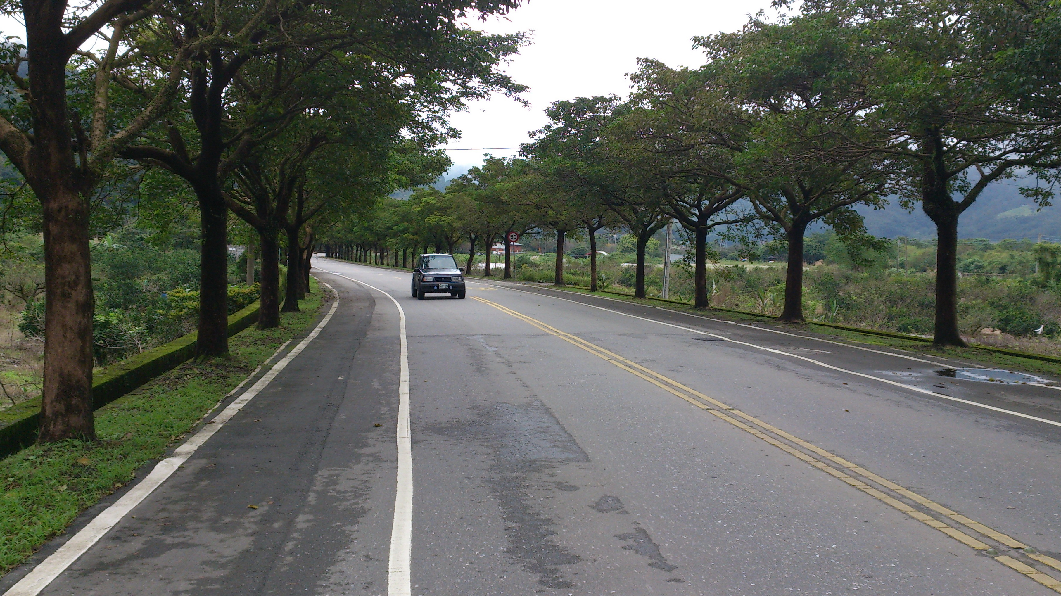 Taiwan Highway 7C 省道七丙